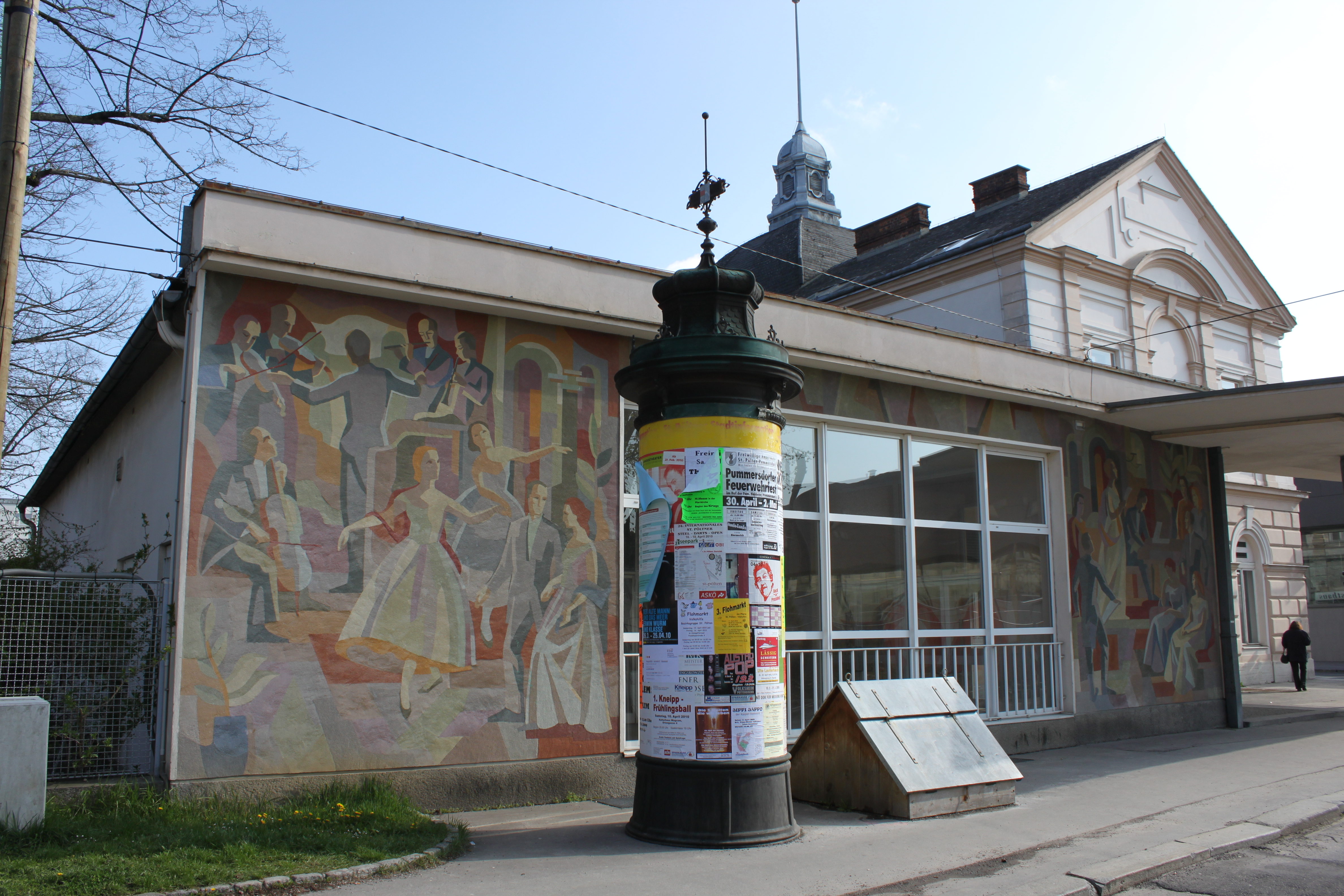 Stadtsäle (St. Pölten), Foyer errichtet 1954-1959 mit Architekt Paul Pfaffenbichler, Fassadenmalerei von Maria Sturm, Ballszene und Liederabend